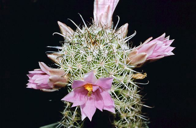 Mammillaria sheldonii